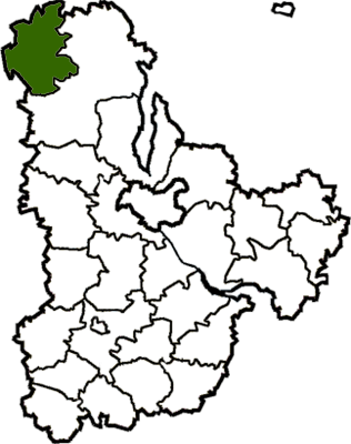 Poliskyi-Raion map